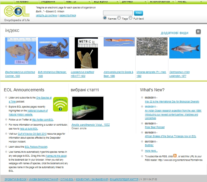 Головна сторінка сайту EOL. На українській мові.